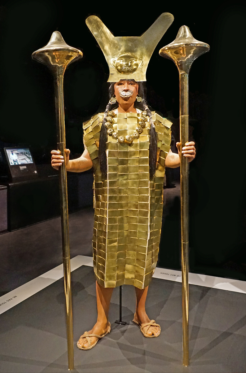 Reconstitution en taille réelle de la Dame de Cao datation de la tombe : 450 ap. J.-C. Culture Moche, Pérou Lors de la fouille de la tombe de la Dame de Cao à El Brujo au Pérou, ses objets de pouvoir (sceptres en forme de masse, couronne et diadème) et les ornements qu'elle portait (bijoux de nez, d'oreilles, colliers) ont été découverts dans son paquet funéraire. Le visage du mannequin a été modelé avec les outils numériques (numériseur 3D, logiciels de modélisation) utilisés dans les protocoles de reconstitution médico-légale. Cette découverte a montré que les femmes pouvaient exercer un pouvoir politique dans les civilisations précolombiennes du Pérou. Objet présenté dans l'exposition "Le Pérou avant les Incas" au musée du quai Branly - Jacques Chirac, à Paris